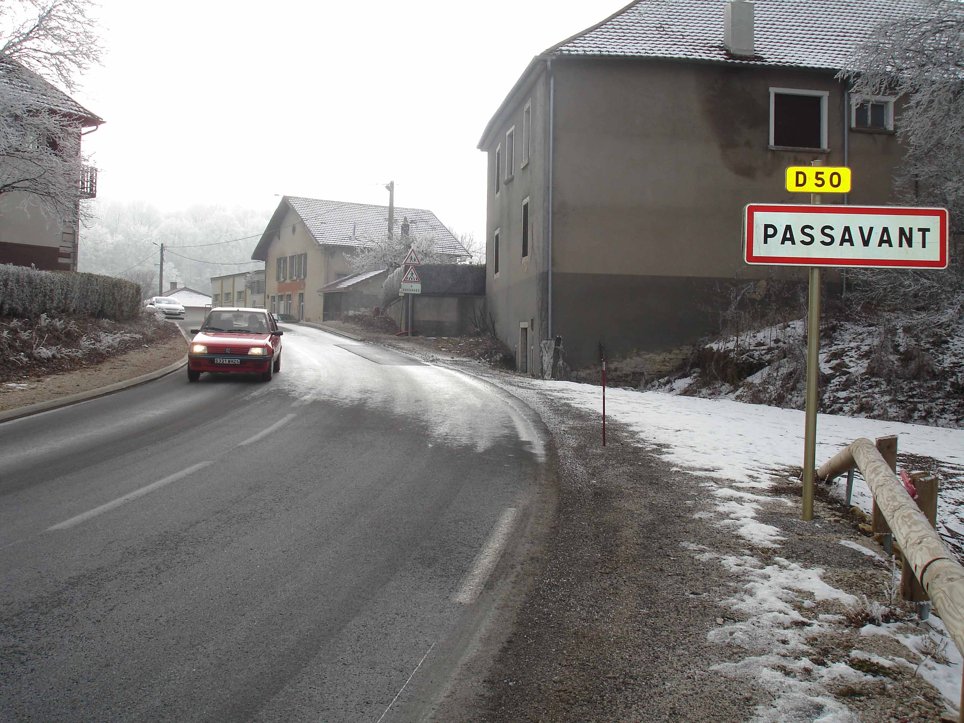 entré du village de Passavant